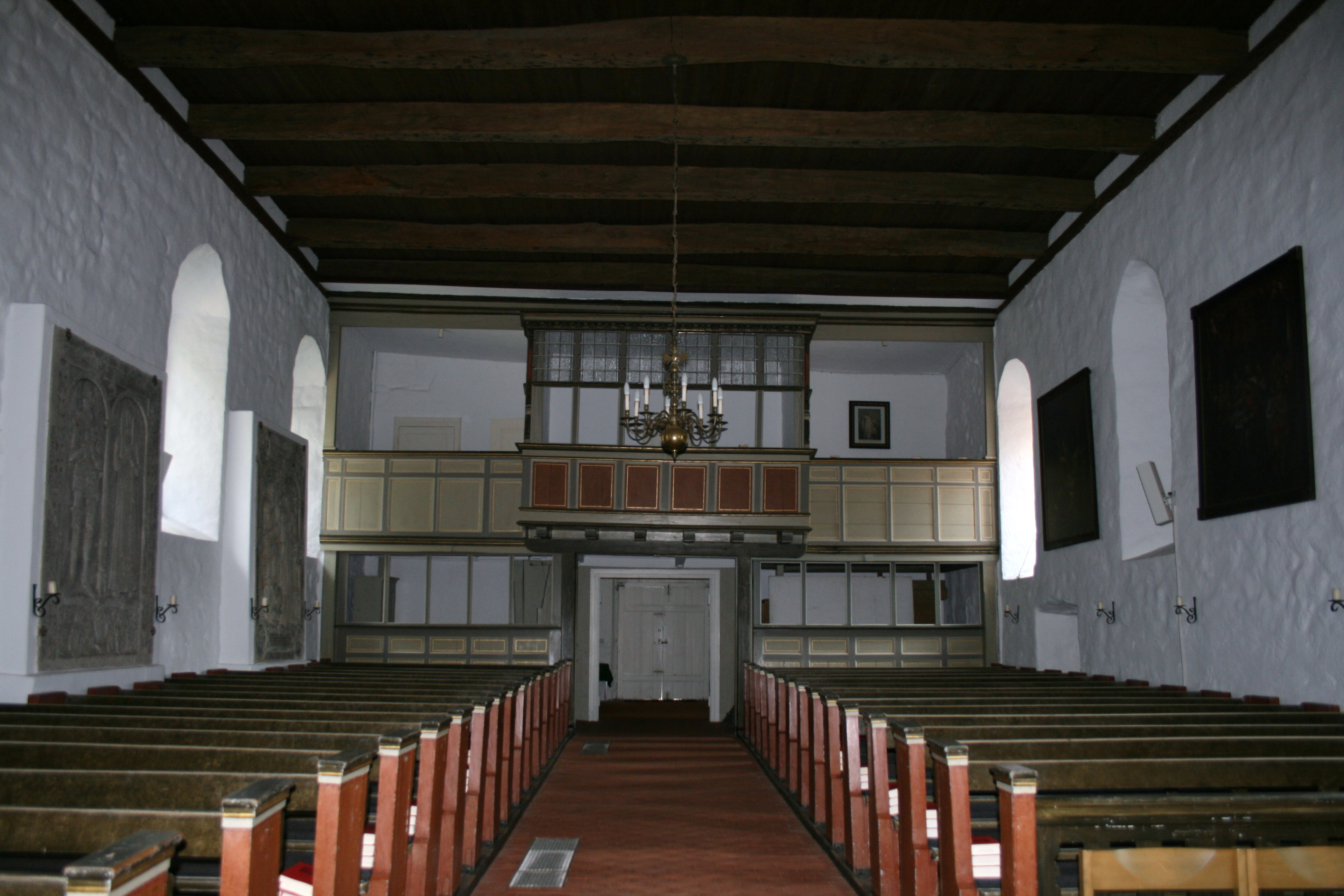 Patronatslogen in der Catharinenkirche Westensee (Schleswig-Holstein)